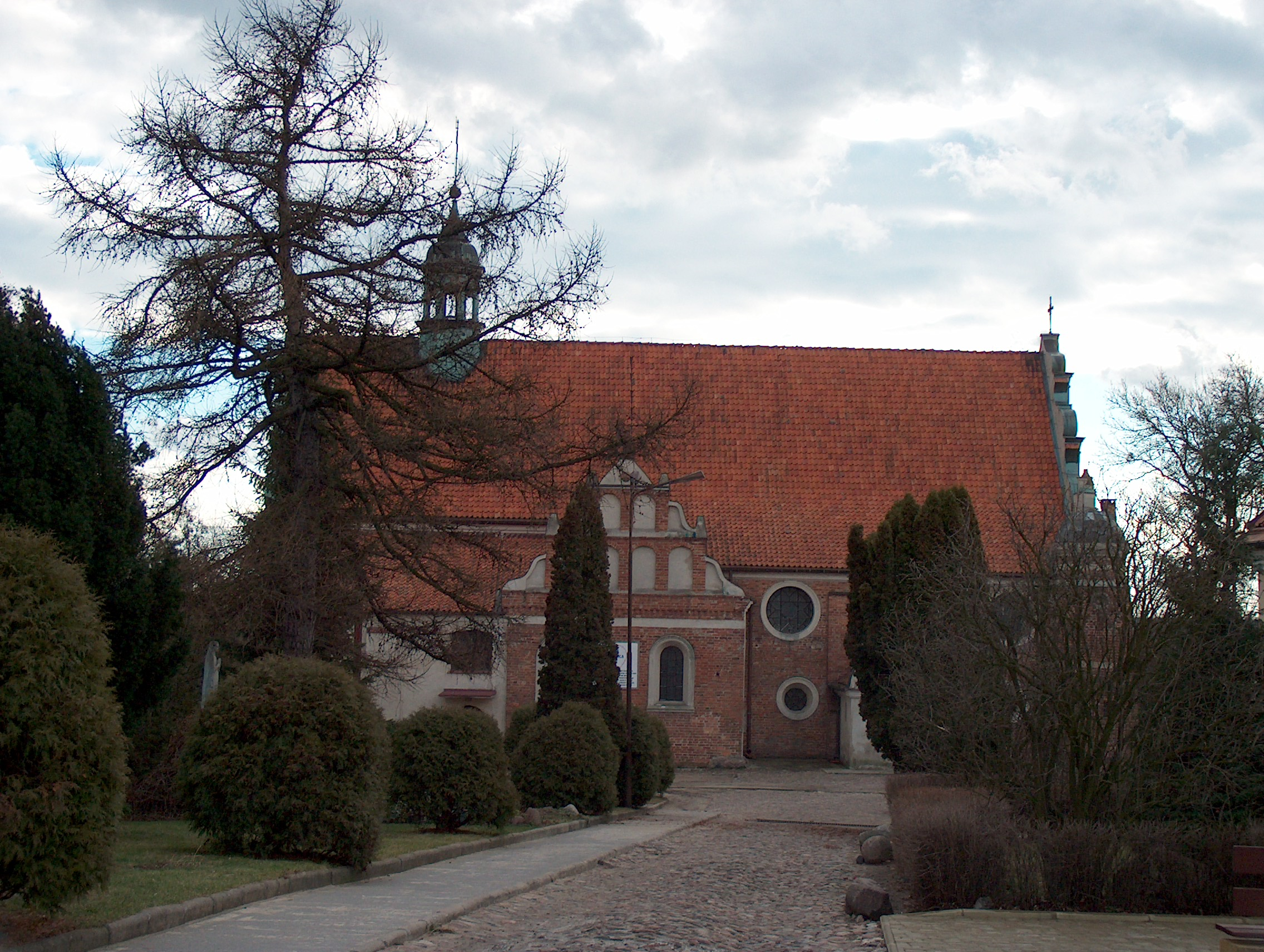 Zakroczym - kościół parafialny gotycko-renesansowy pw. Podwyższenia Krzyża z XV/XVI w. (zabytek nr rejestr. 1122/144)